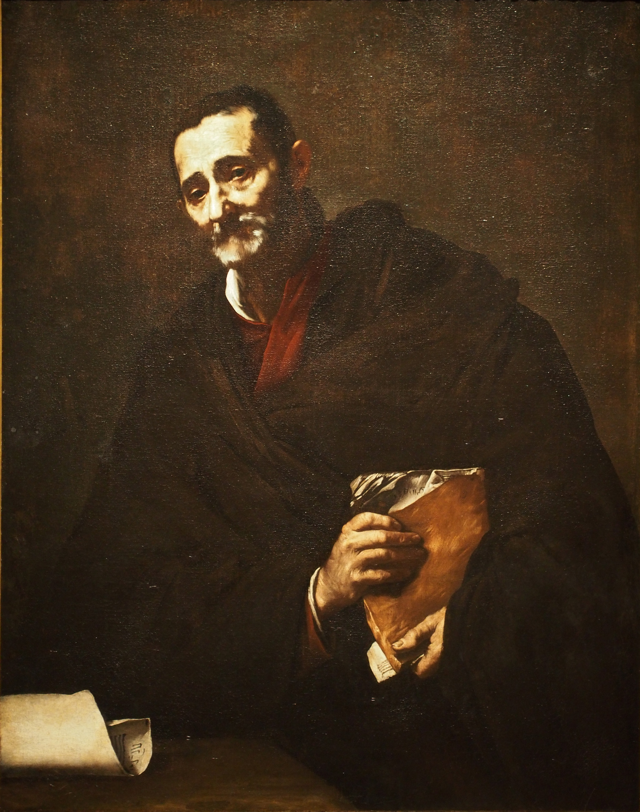 La obra representa al filósofo griego Heráclito.